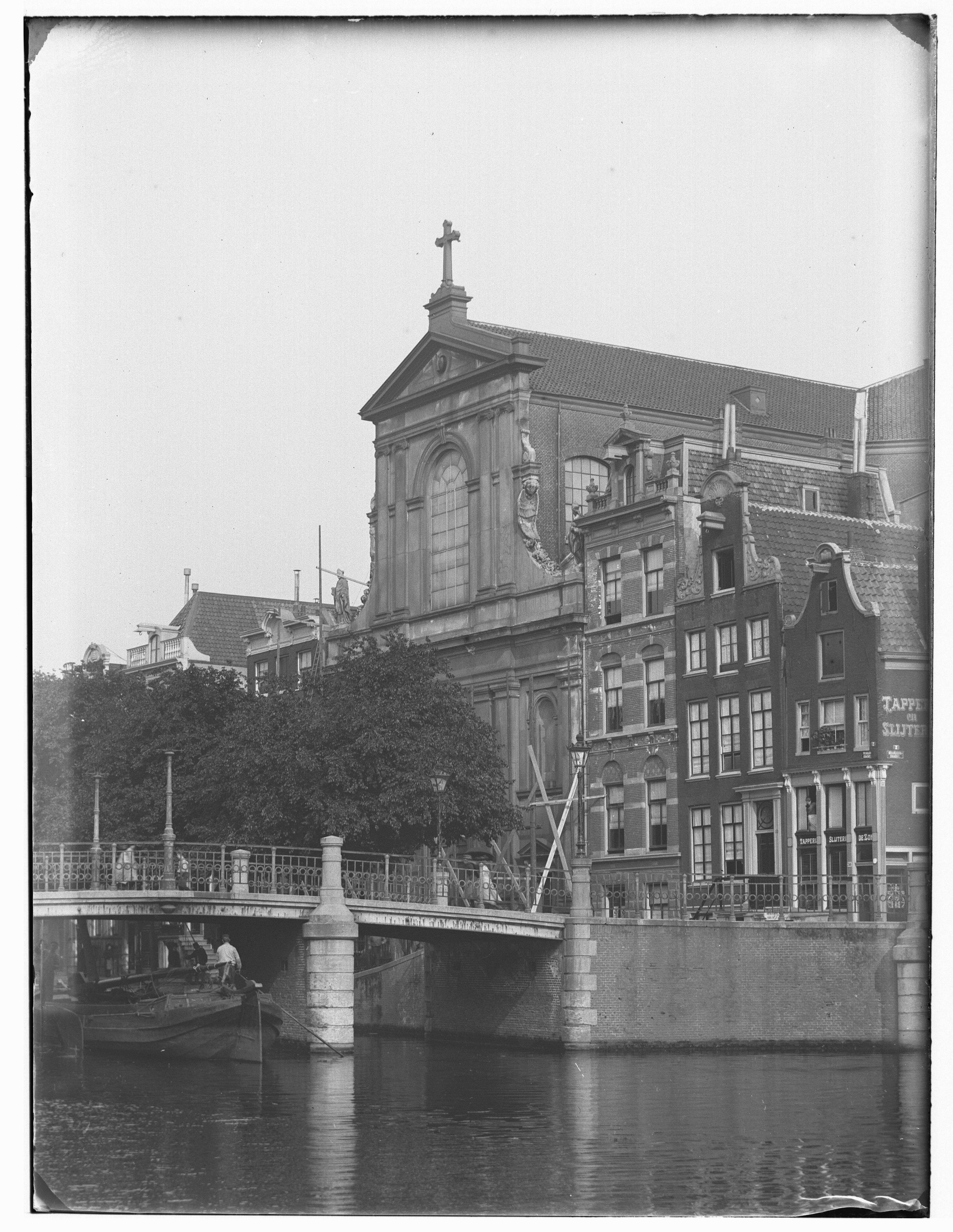 Beschrijving Prinsengracht 750 t/m 760 (v.r.n.l.) Brug nr. 71 voor de Reguliersgracht. Op nr. 756 is r.-k. kerk 'De Duif'. Rechts is ingang Reguliersgracht. Documenttype foto Vervaardiger Olie``, Jacob (1834-1905) Collectie Collectie Jacob Olie Jbz. Datering 1890 Geografische naam Prinsengracht Inventarissen Afbeeldingsbestand 010019000045 Generated with Dememorixer